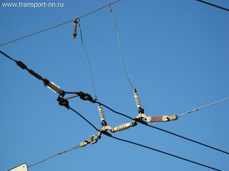 Троллейбусный тупик в Нижнем Новгороде